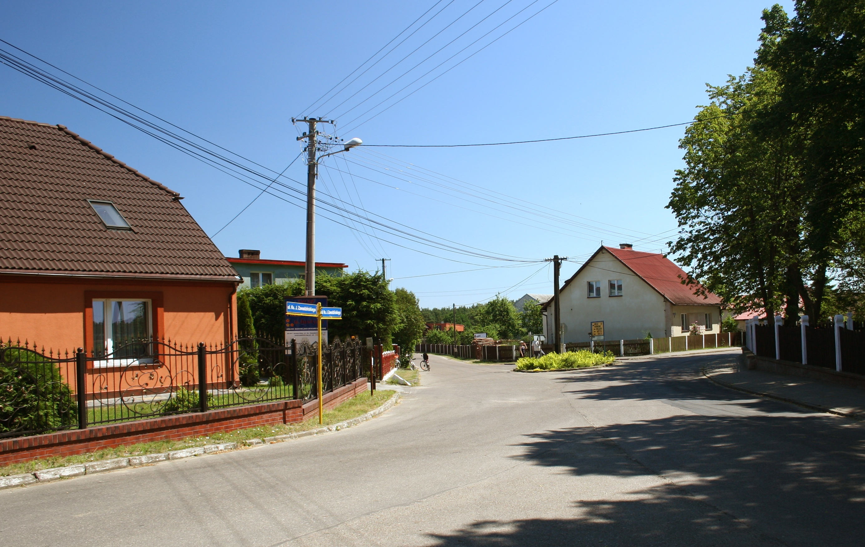 Odry - centrum miejscowości, , powiat chojnicki